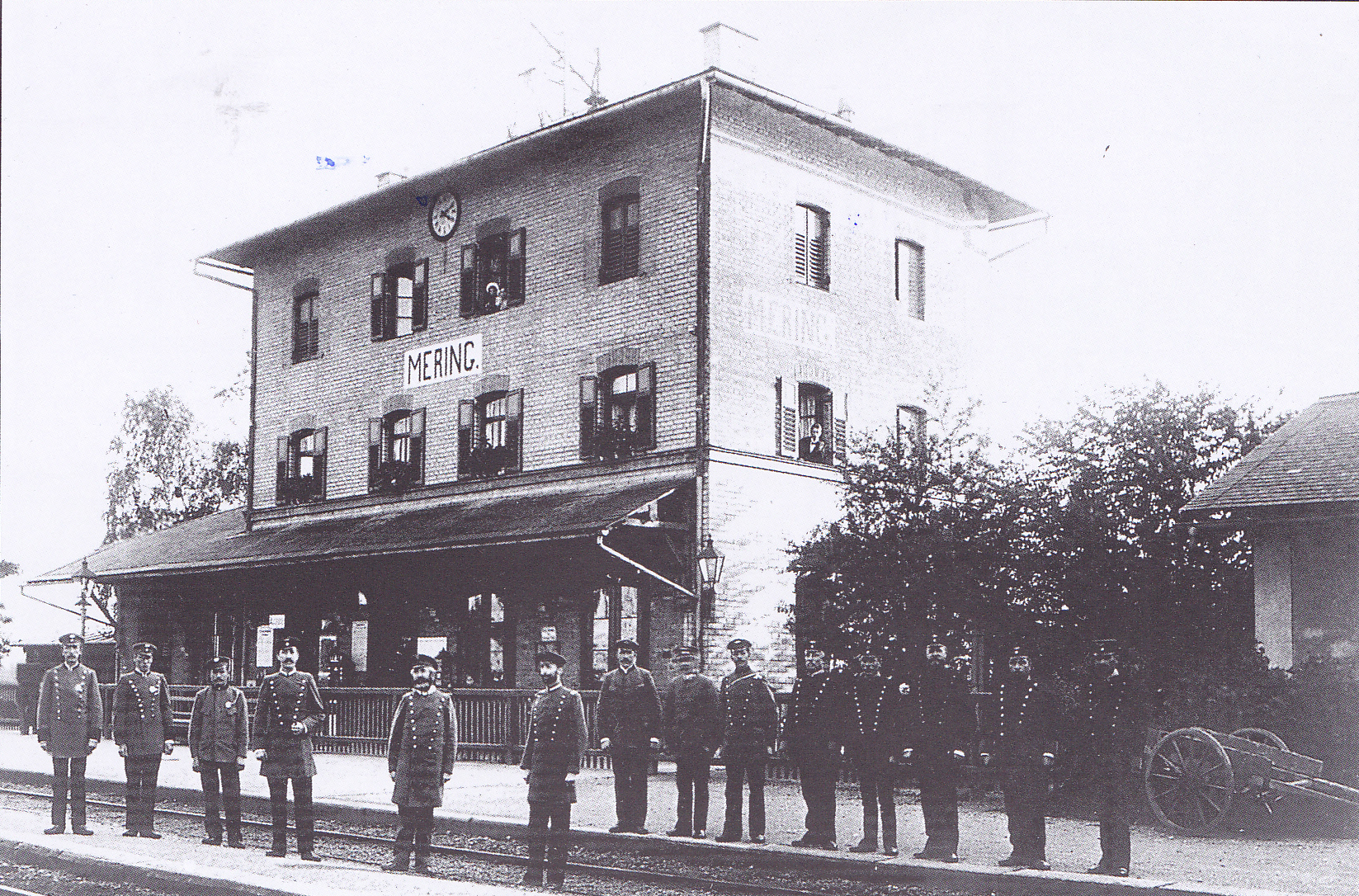 Erstes Empfangsgebäude des Bahnhofs Mering von der Gleisseite mit Bahnhofspersonal